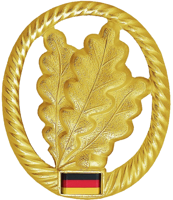 Barettabzeichen der Jägertruppe der Bundeswehr Barettfarbe: Jägergrün Maße: Hoch: 53mm Breit: 46mm Ausführung: gold, Metall